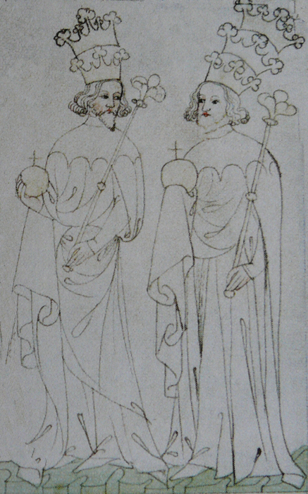 Václav II. a Václav III.